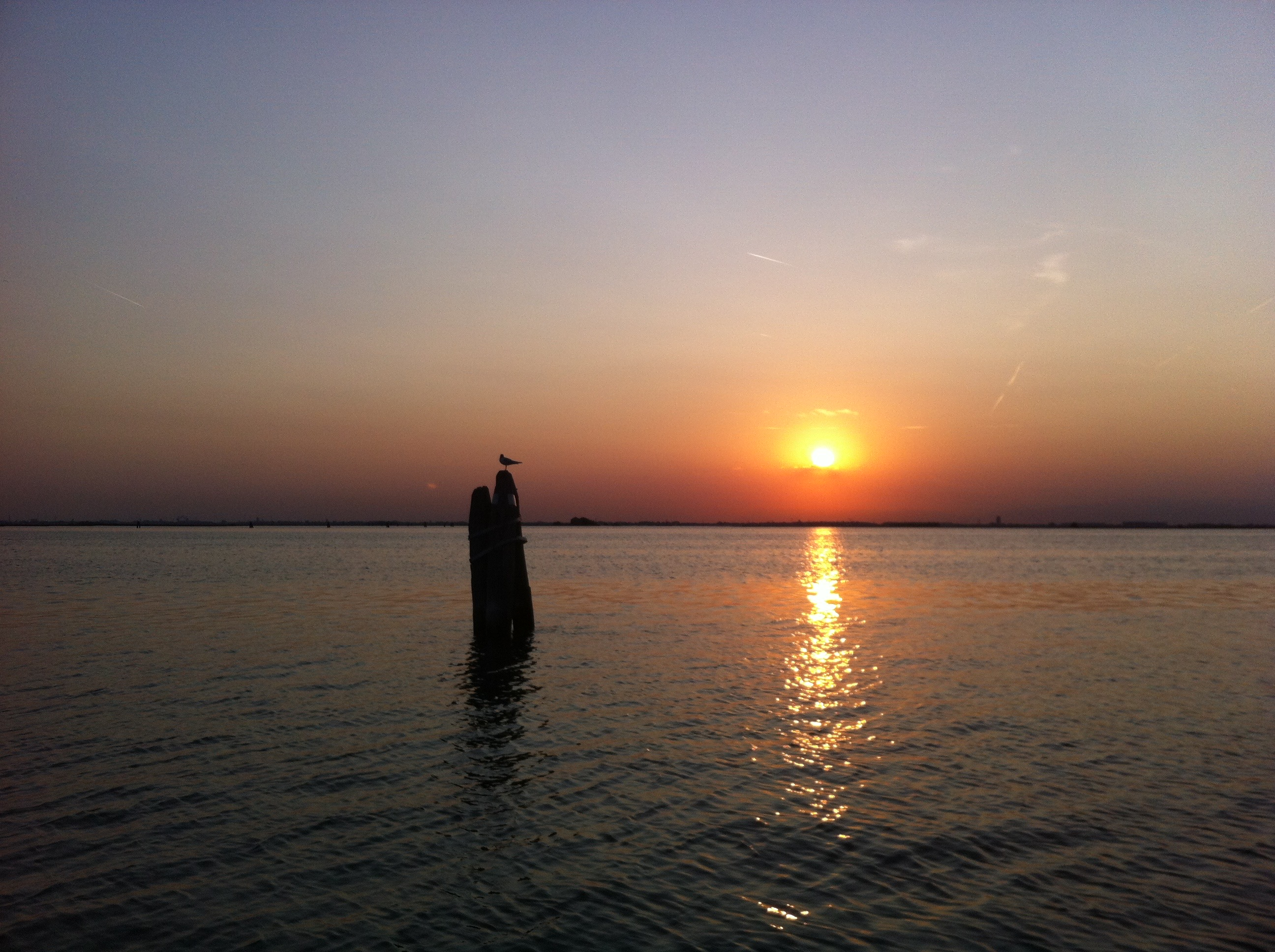 Laguna di Venezia (Q55719879)